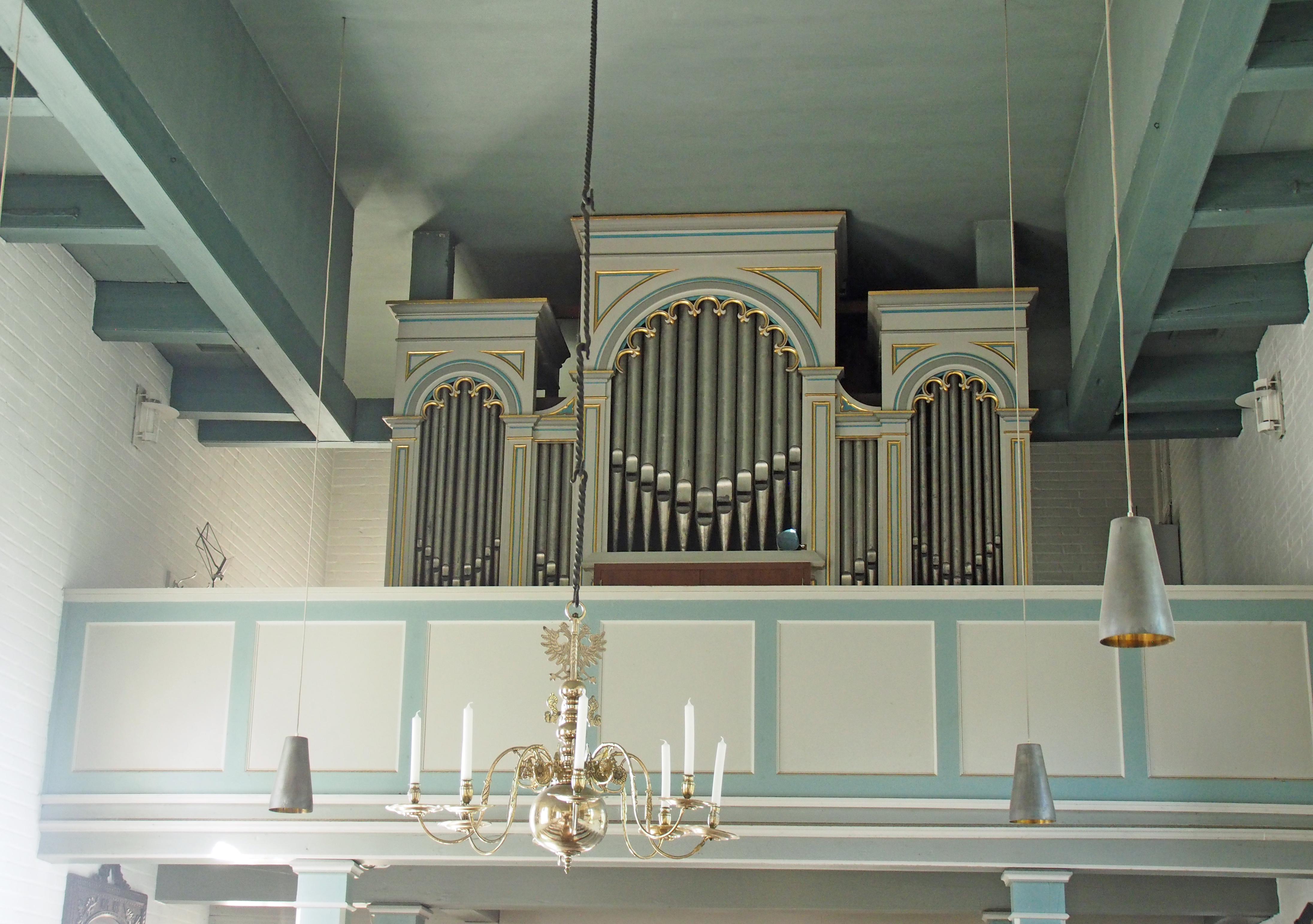 Orgel in der Kirche St. Niels, Westerland (Sylt)